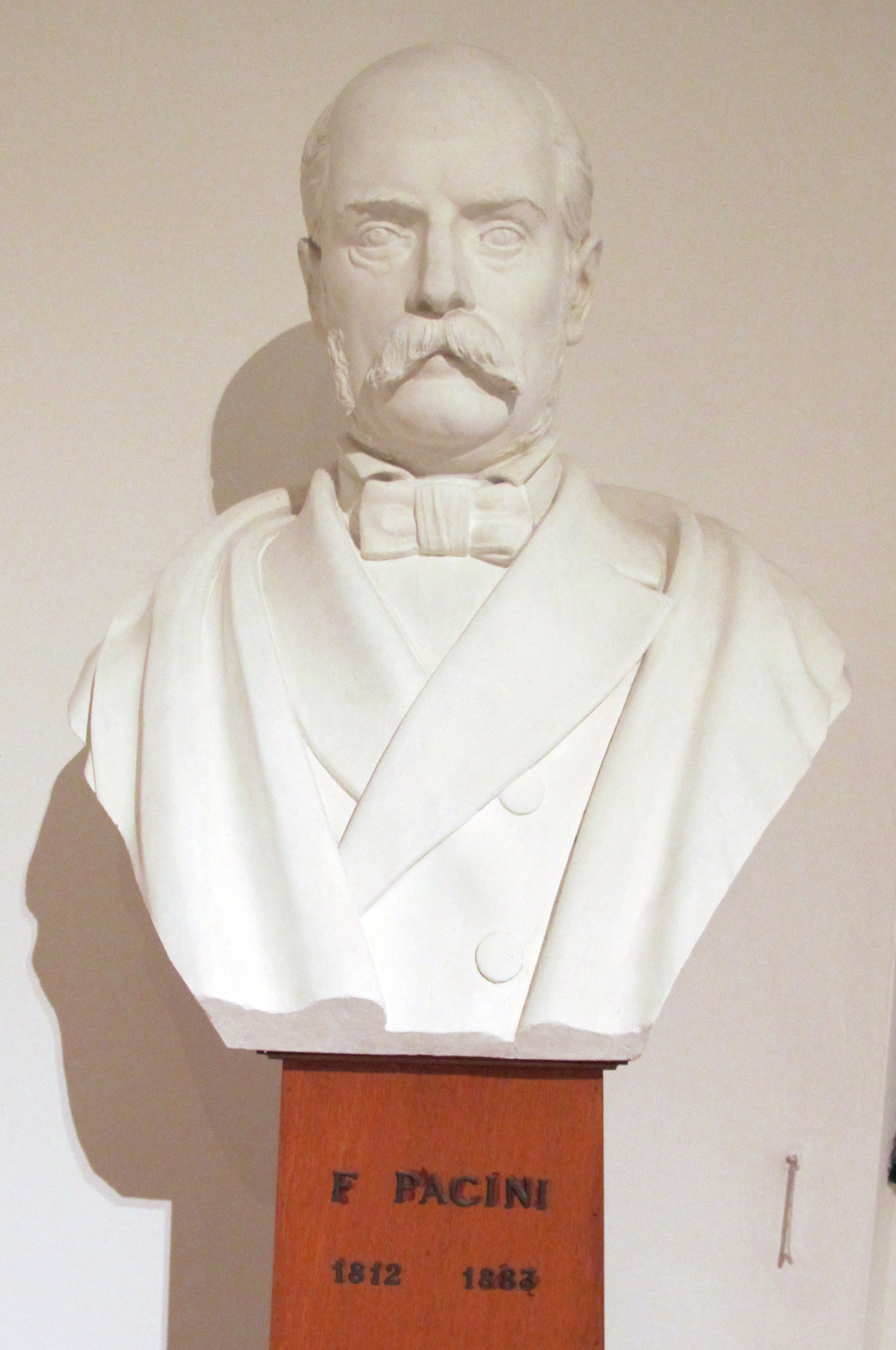 Istituto di anatomia patologica, museo, busto filippo pacini